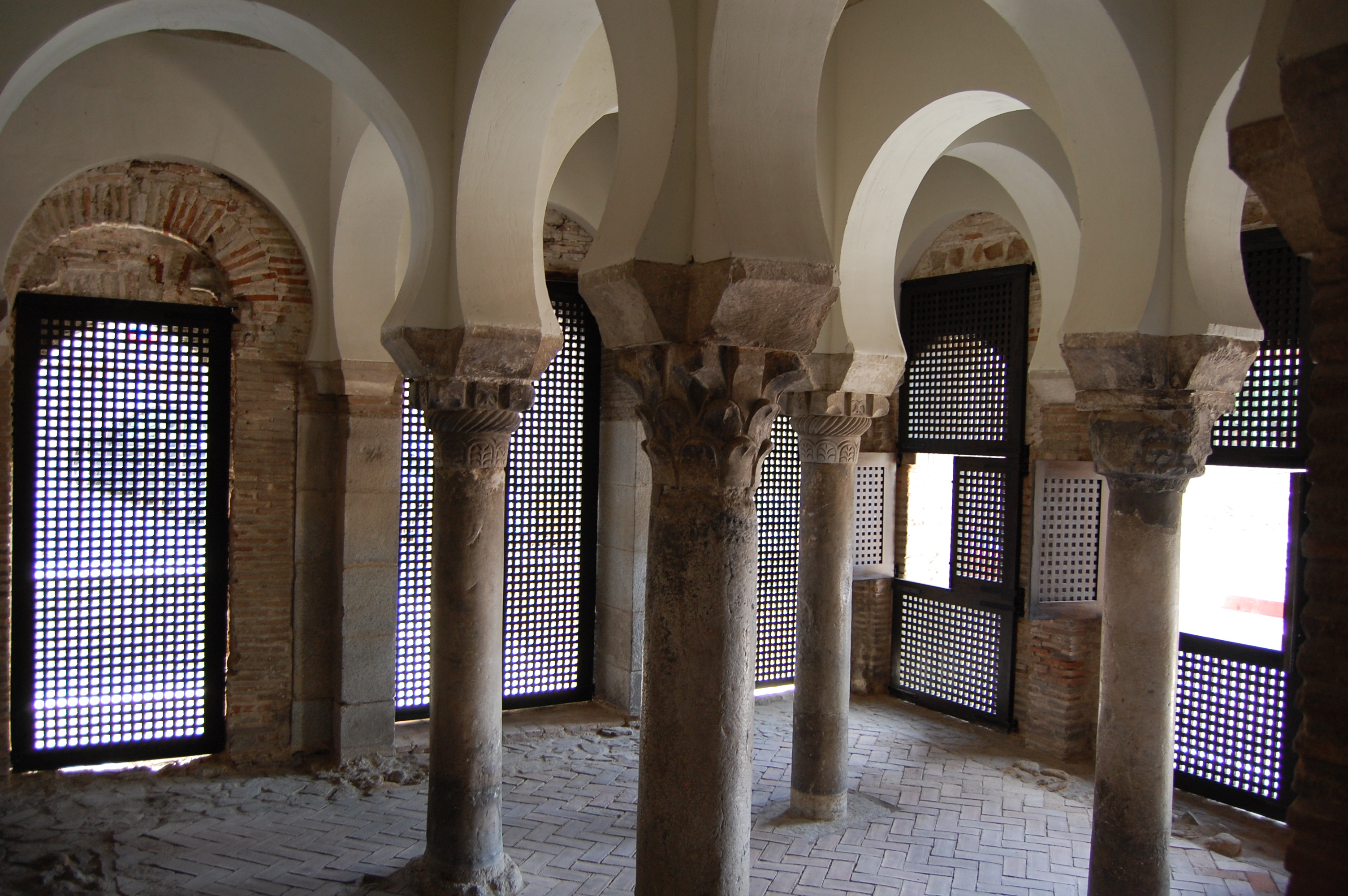 Antigua mezquita de Bab al Mardum. Iglesia del Cristo de la Luz, Toledo (España). Arte omeya de al-Andalus, año 999.